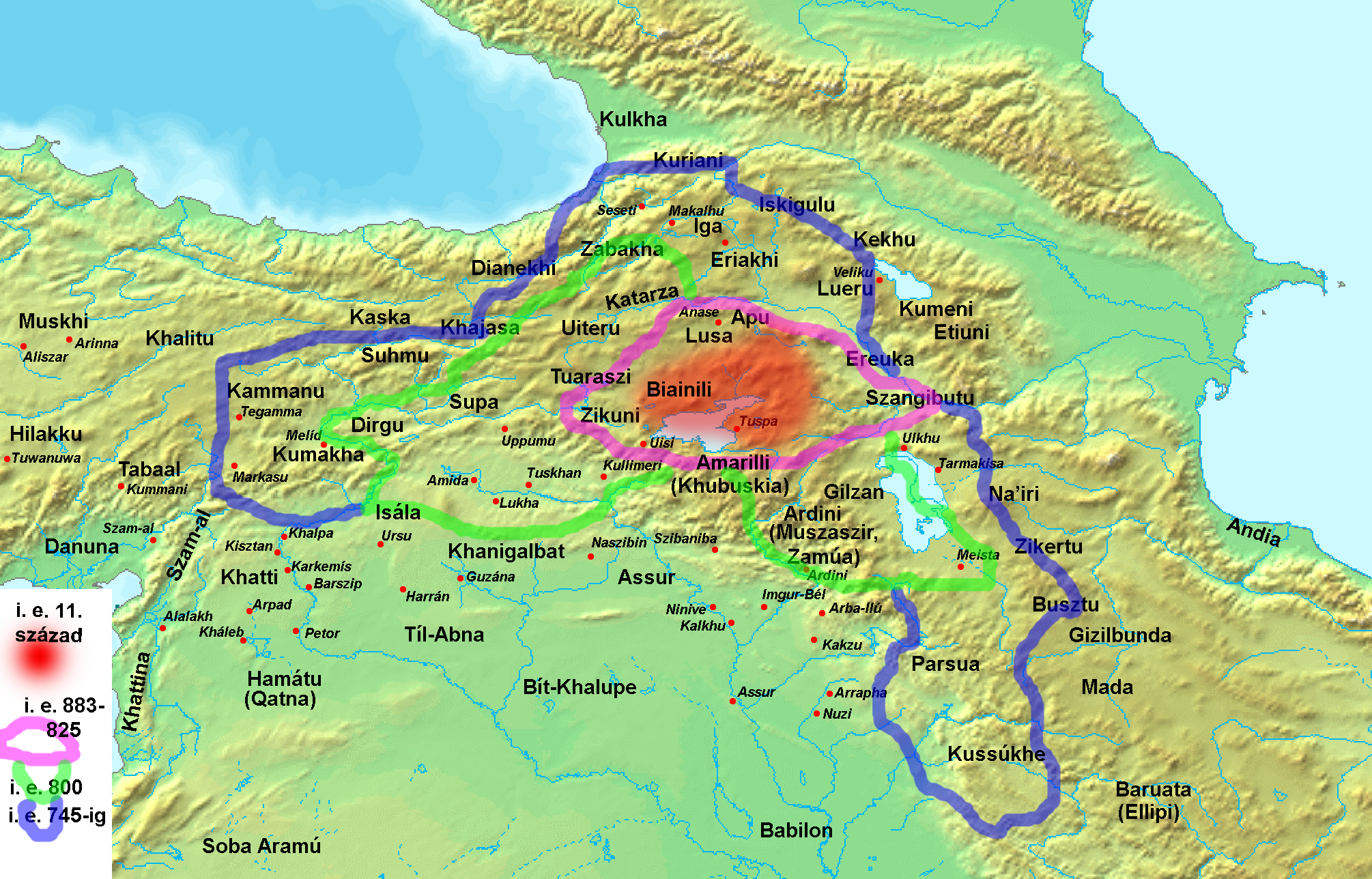 Urartu területi változásai i. e. 745-ig